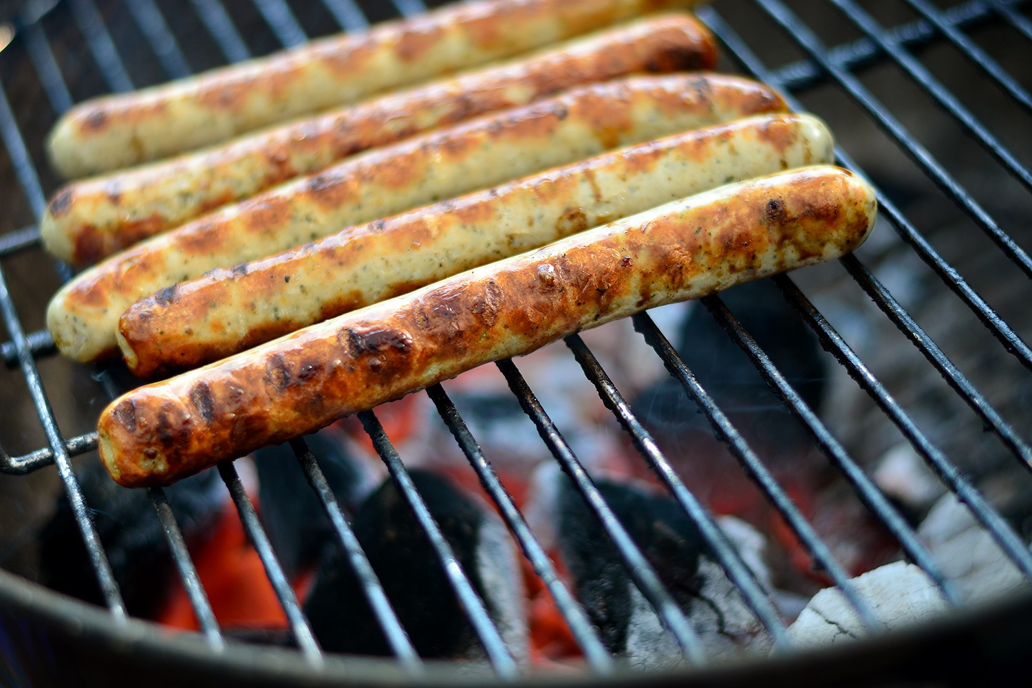 Würstchen auf dem Grill, Datum/Uhrzeit: 12.07.2013 18:45:35